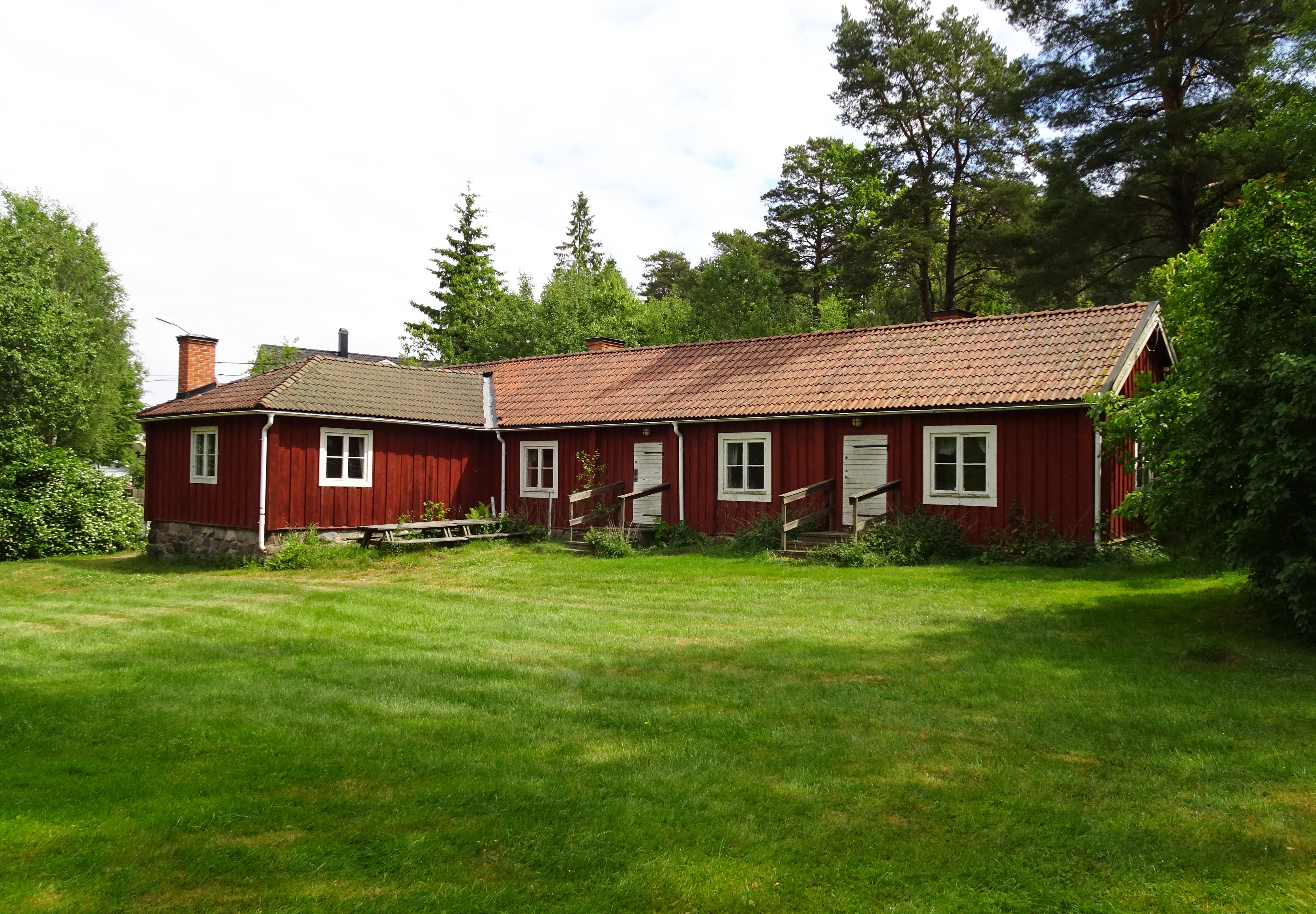 Glömstastugan